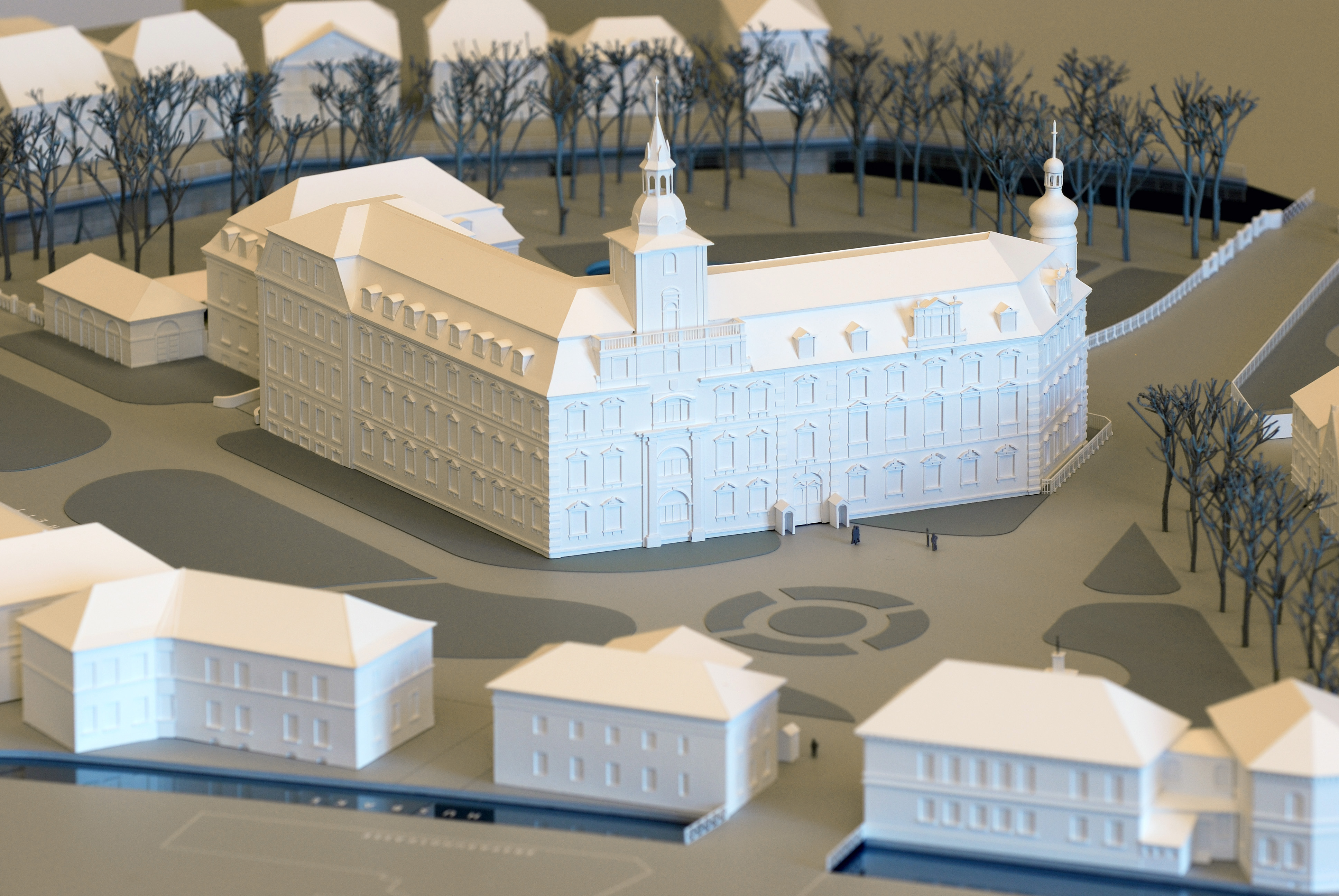 Papiermodell, Schlosszustand um 1890